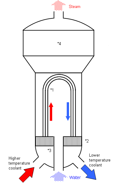 中文（中国大陆）: 典型的核反应堆蒸汽发生器结构示意图。